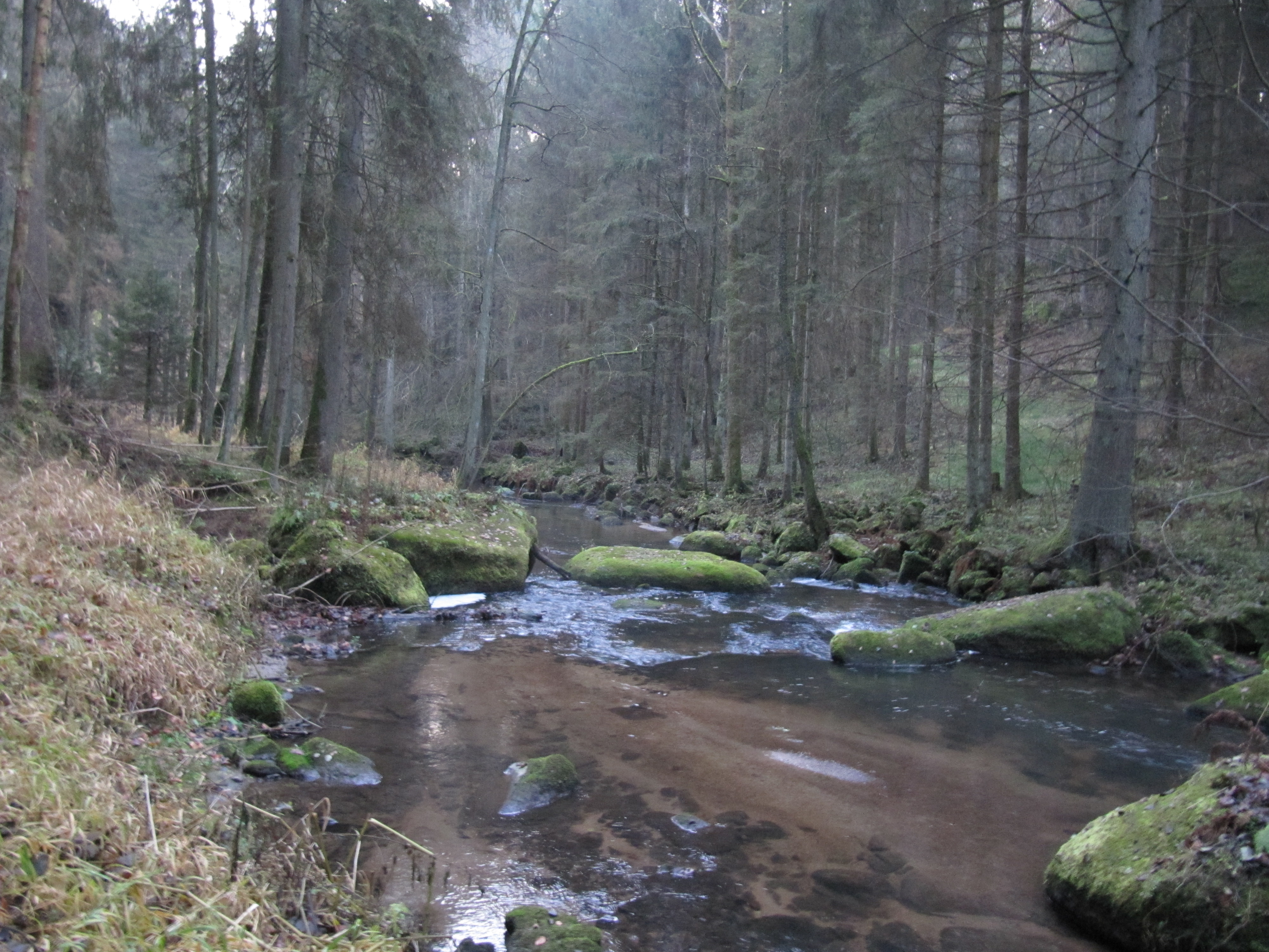 Die Kleine Mühl in Sarleinsbach